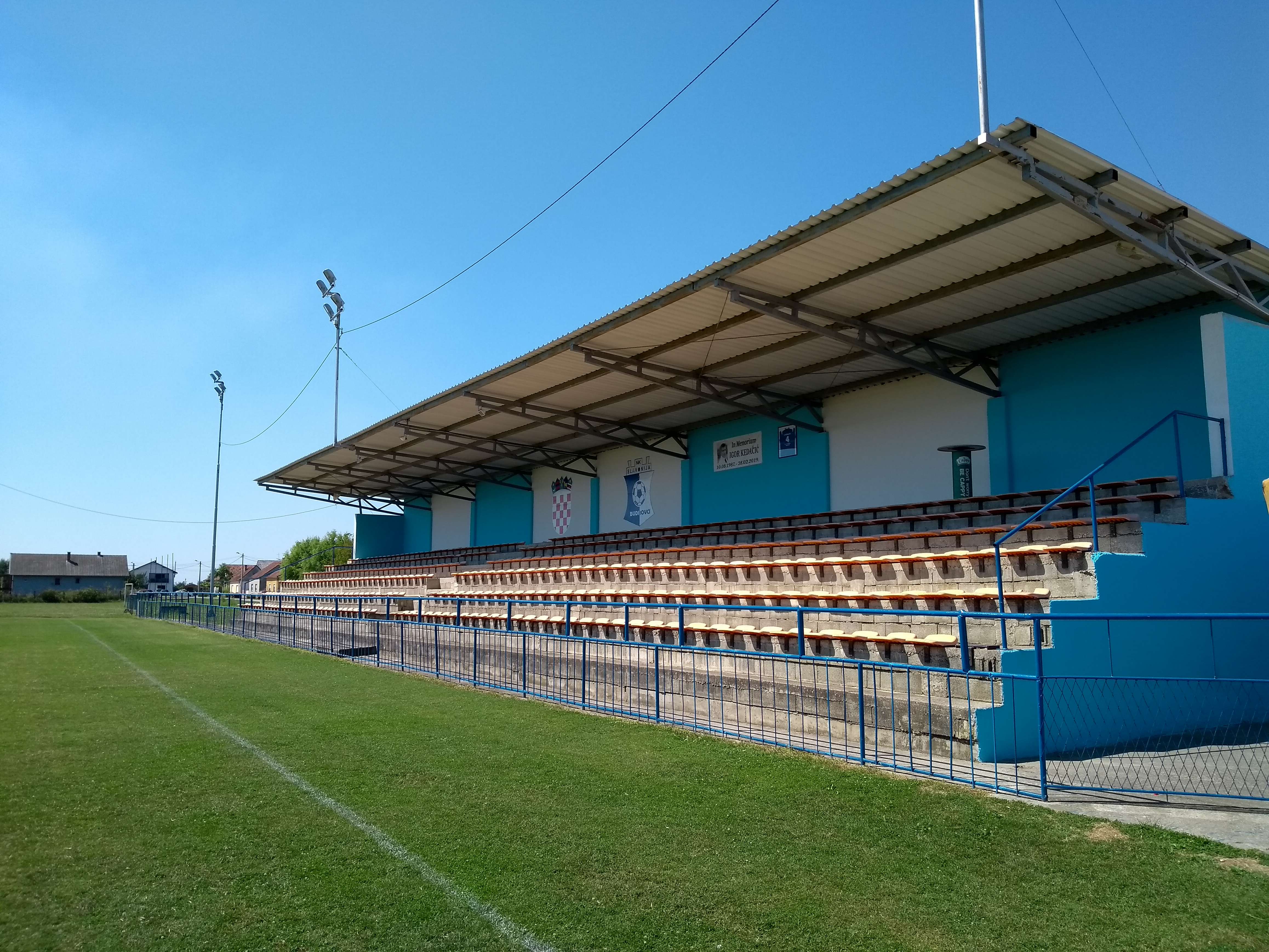 Tribina NK Slavonija Budrovci